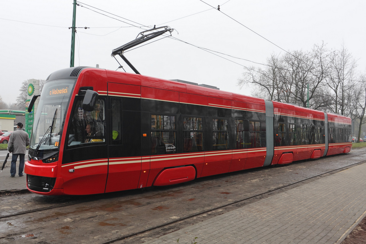 Pesa Twist w barwach Tramwajów Śląskich.